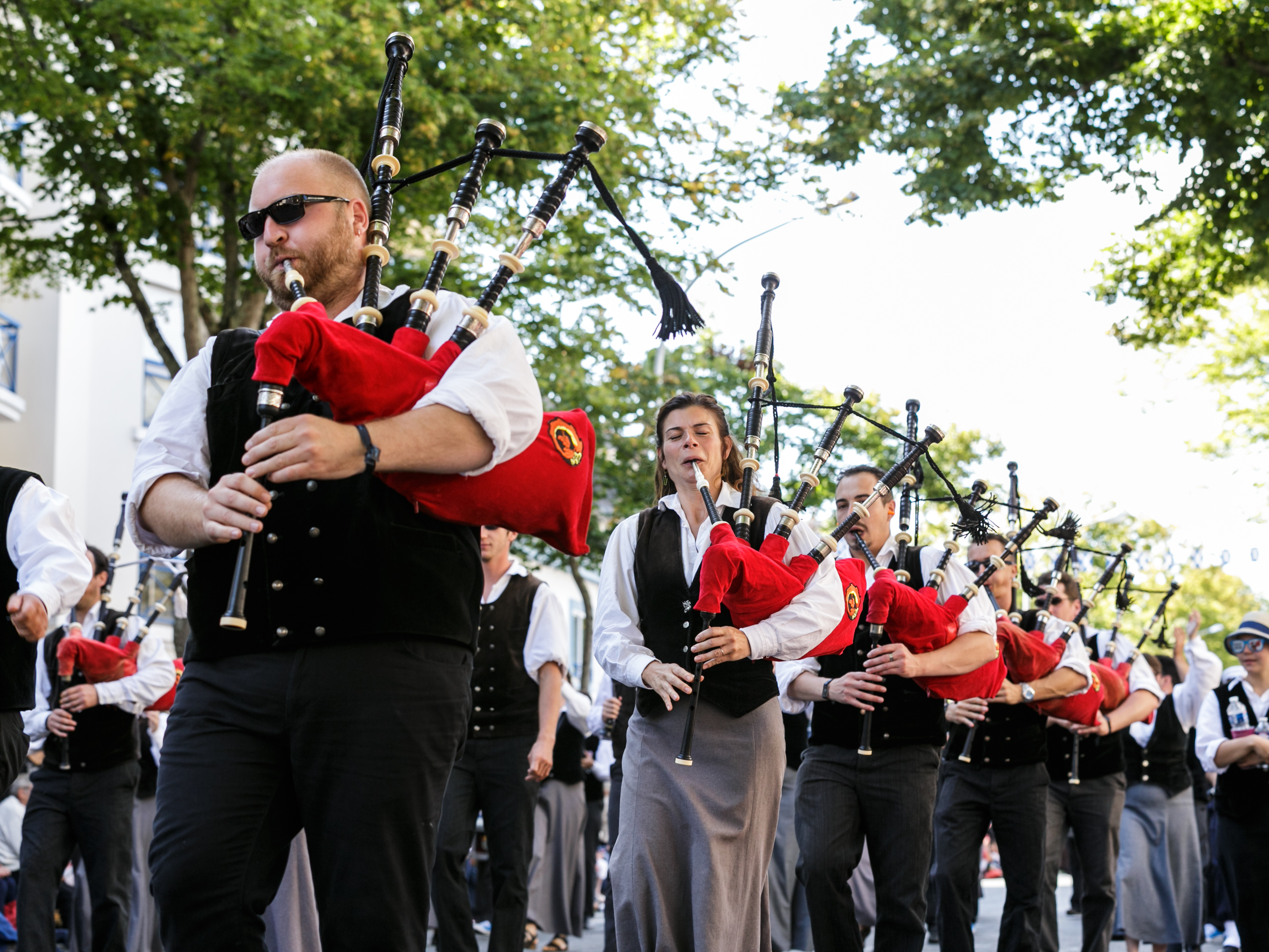 Festival Interceltique de Lorient 2017 - Grande parade des nations celtes - Bagad Sonerien Bro Dreger (Perros-Guirec)